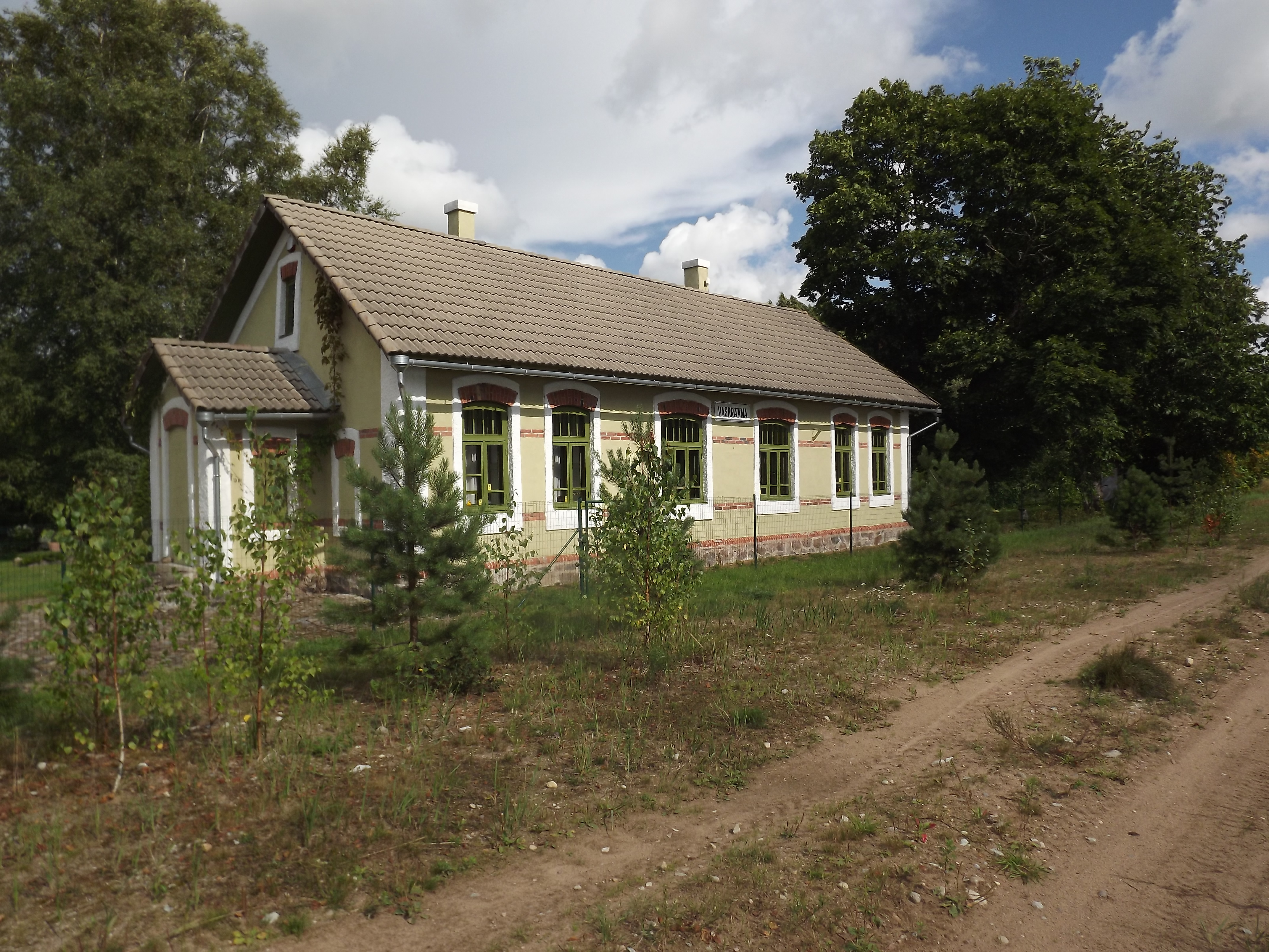 Vaskrääma jaamahoone